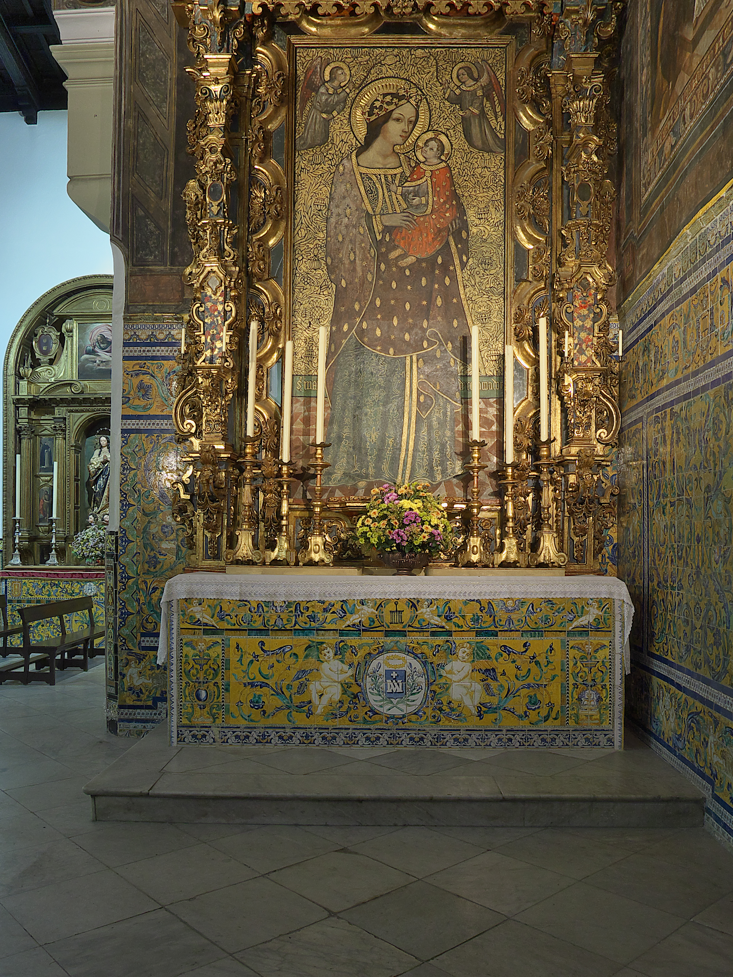 Iglesia de San Lorenzo (Sevilla). Una de las tres pinturales murales más antiguas de la ciudad. Devoción mariana originaria de Rocamadour y sin documentos sobre su llegada a Sevilla. Pintura al temple sobre enlucido de yeso (ss. XIV-XV)